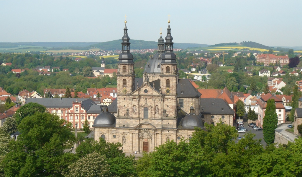 Ort: Fulda